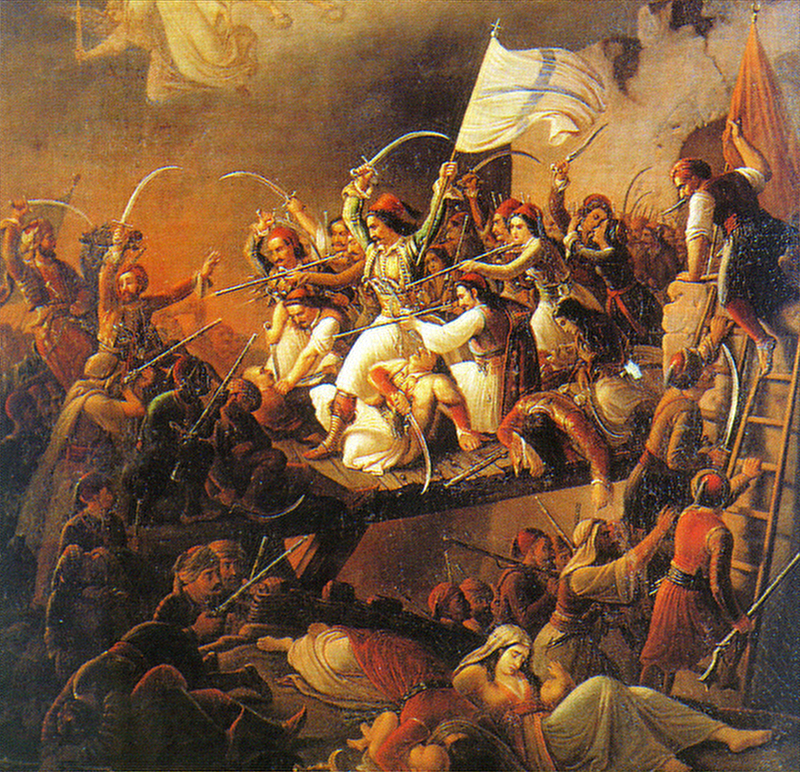 La sortie de Missolonghi (détail).